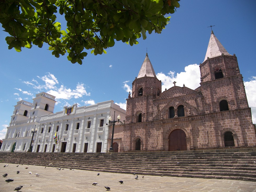 Fachada del frontis del parque principal, en los extremos: la iglesia del Perpetuo Socorro y la iglesia en piedra San Francisco Javier, en el centro se encuentra el Palacio Municipal o Casa Consistorial